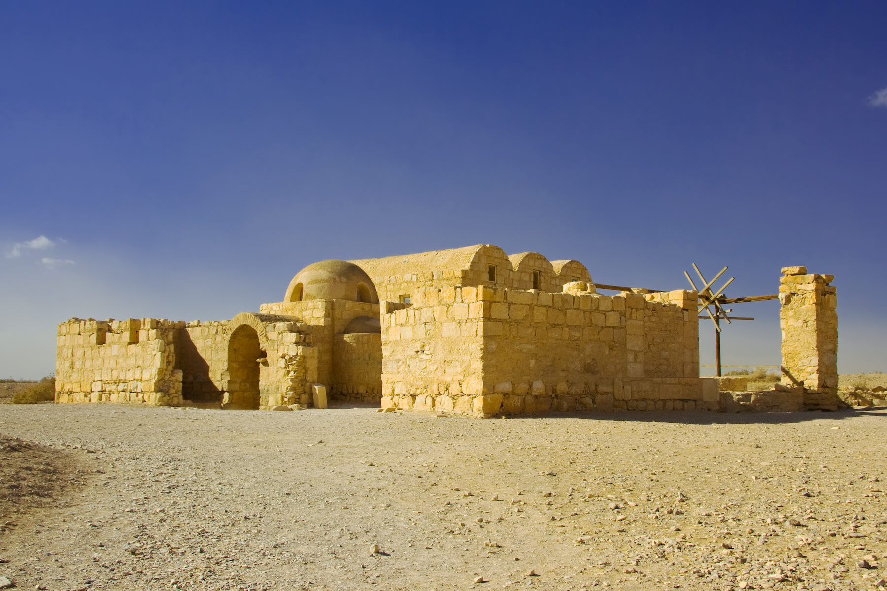 Qasr Amra in Jordan.